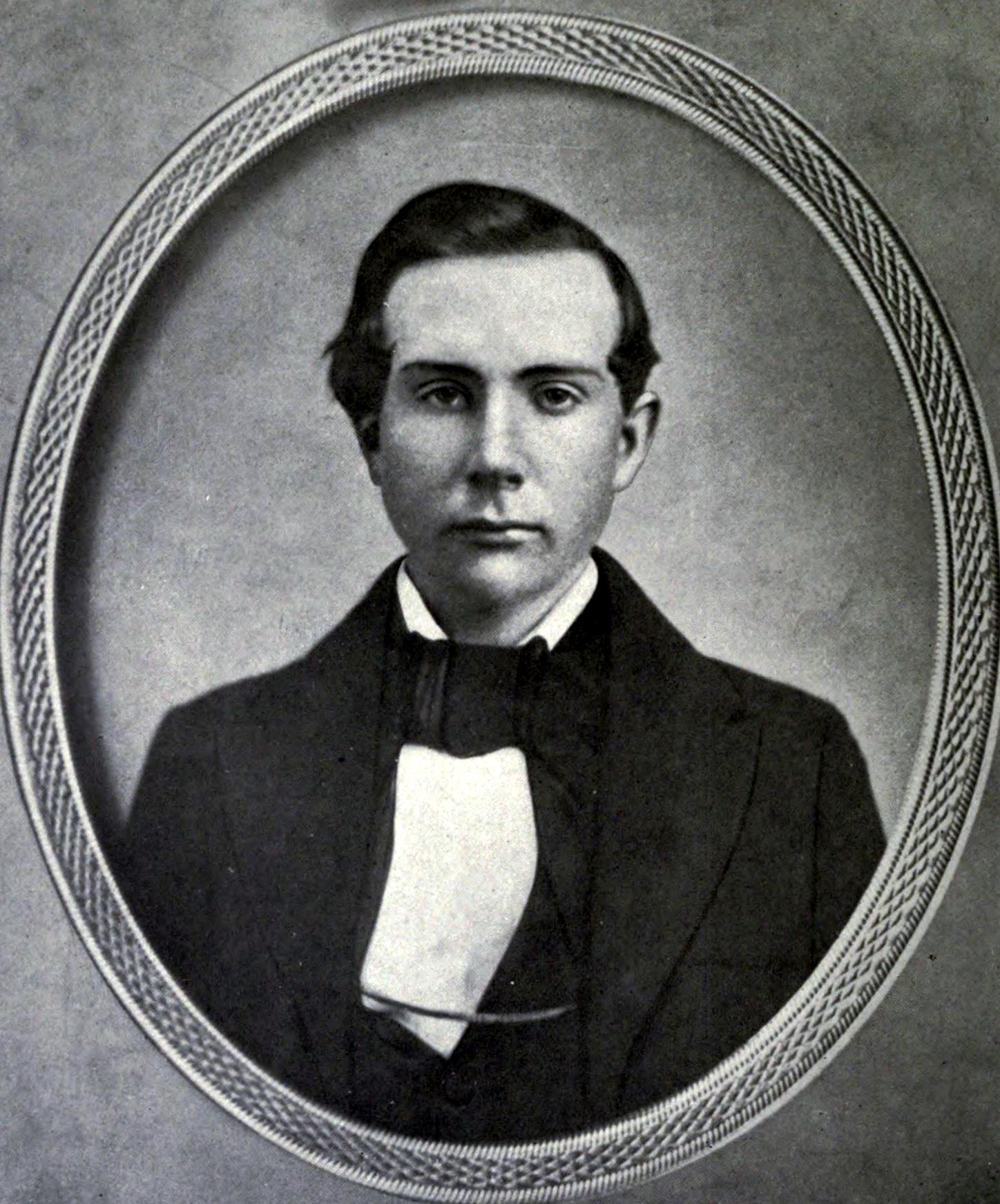 John D. Rockefeller aged 18